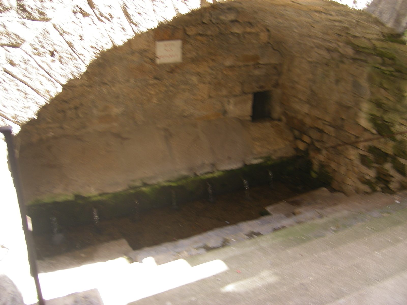 Mende, France